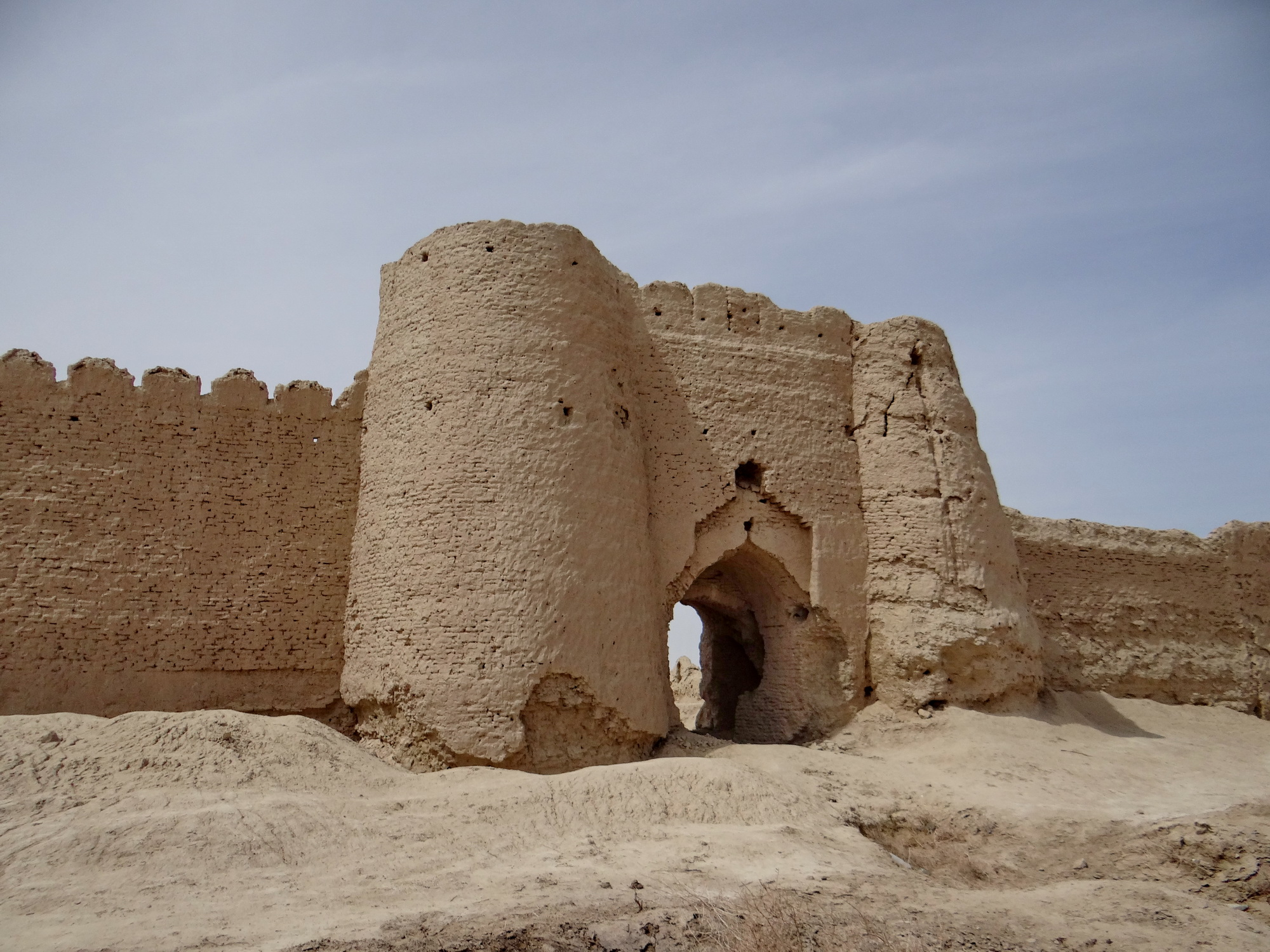 ورودی قلعه رستم سال 1392